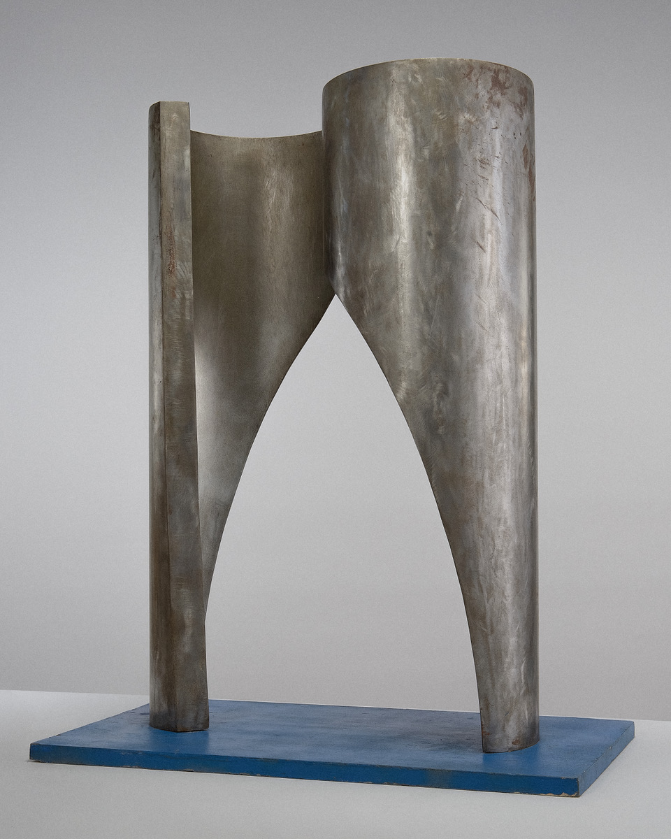 Magdalena Więcek, Sacrum IV, 1972, stal, 100 x 65 x 32 cm